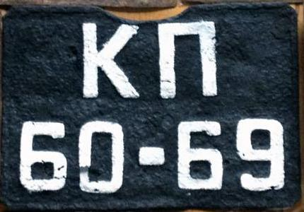 Задний автомобильный номер СССР образца 1936 года